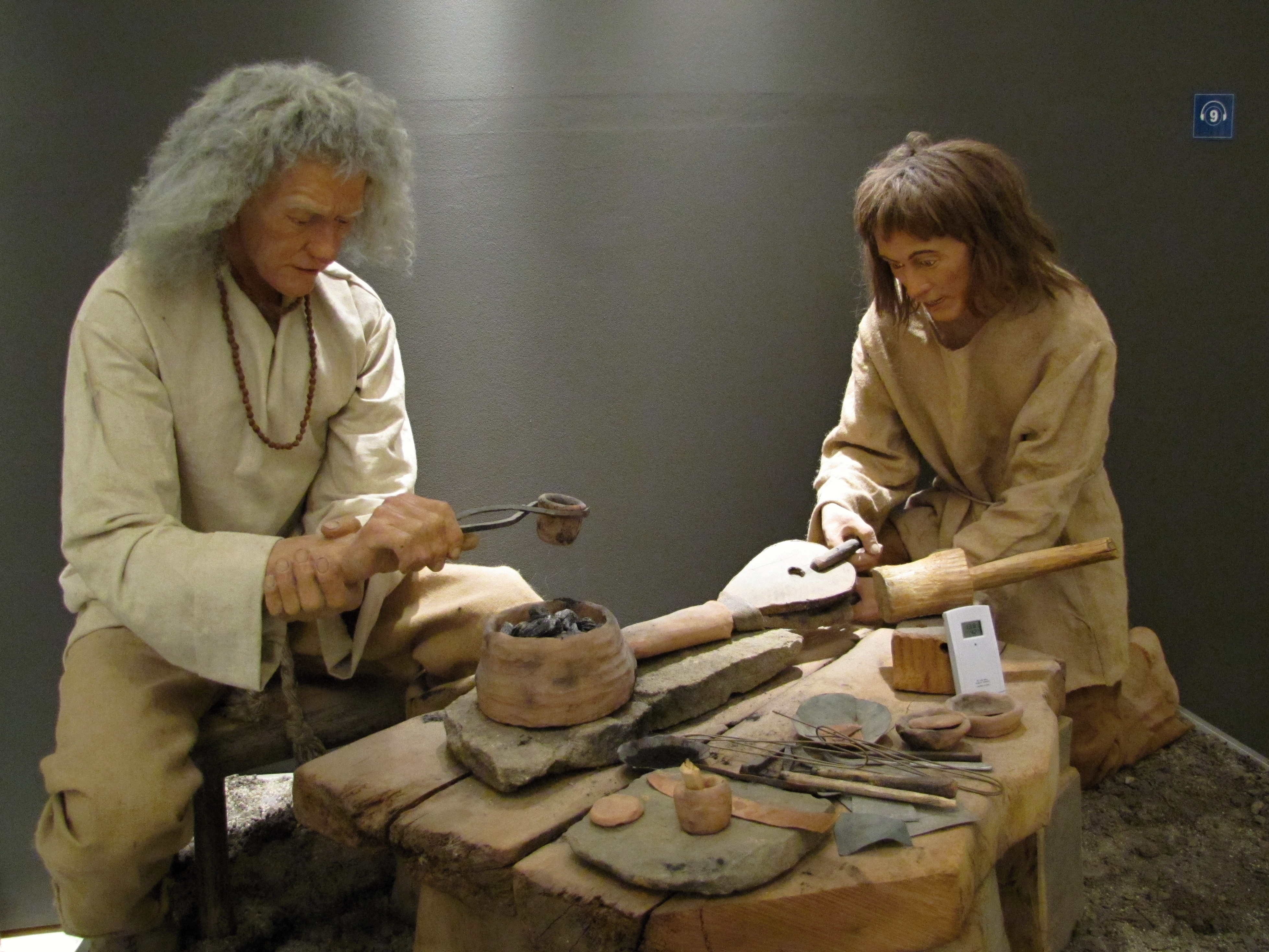 Expozice Velkomoravské Pohansko Městského muzea v Břeclavi na zámku Pohansko, ukázka výroby šperků